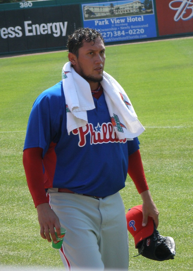 Freddy Garcia